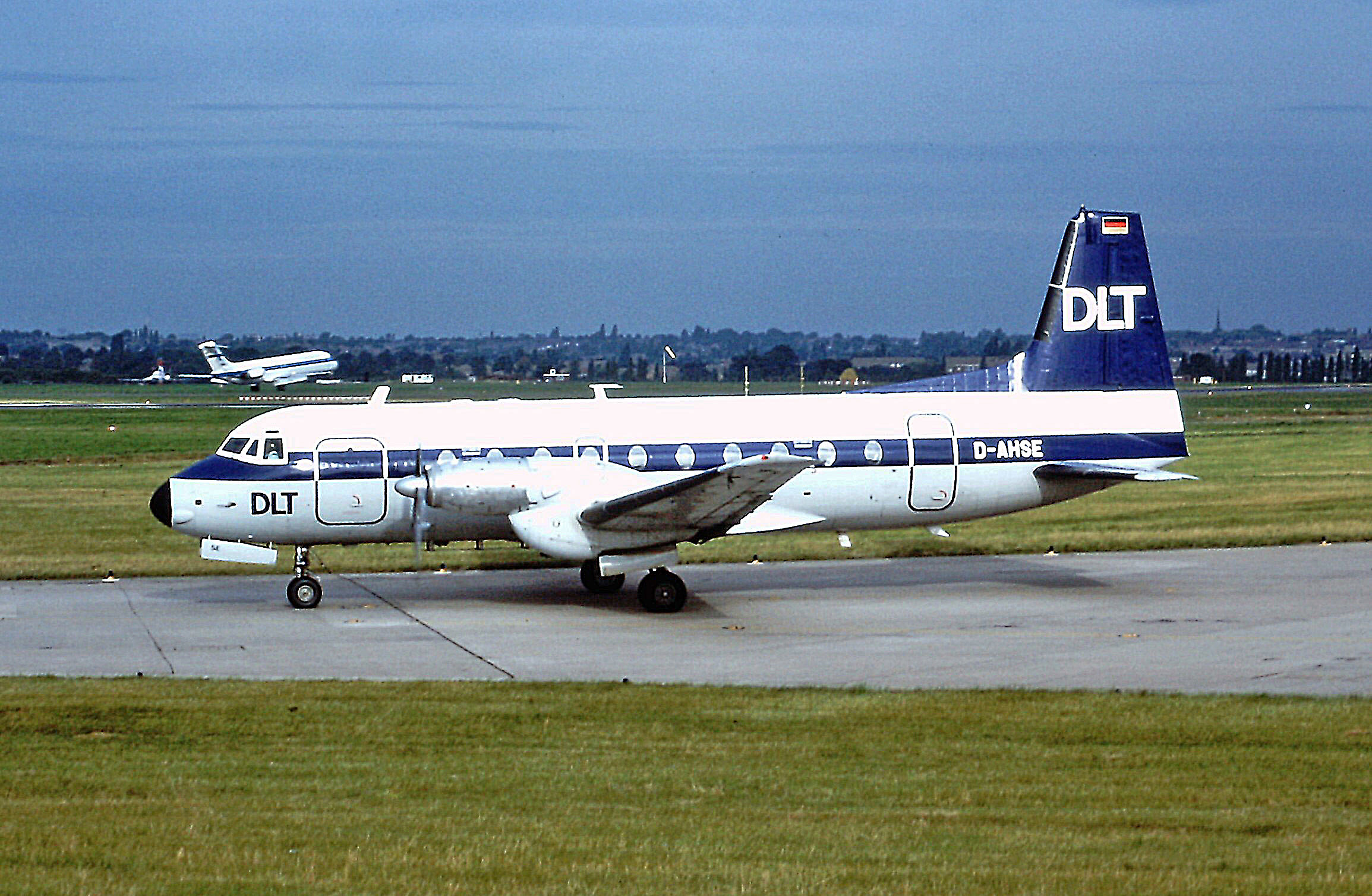 D-AHSE HS748 series 2B DLT Birmingham 10-09-1988